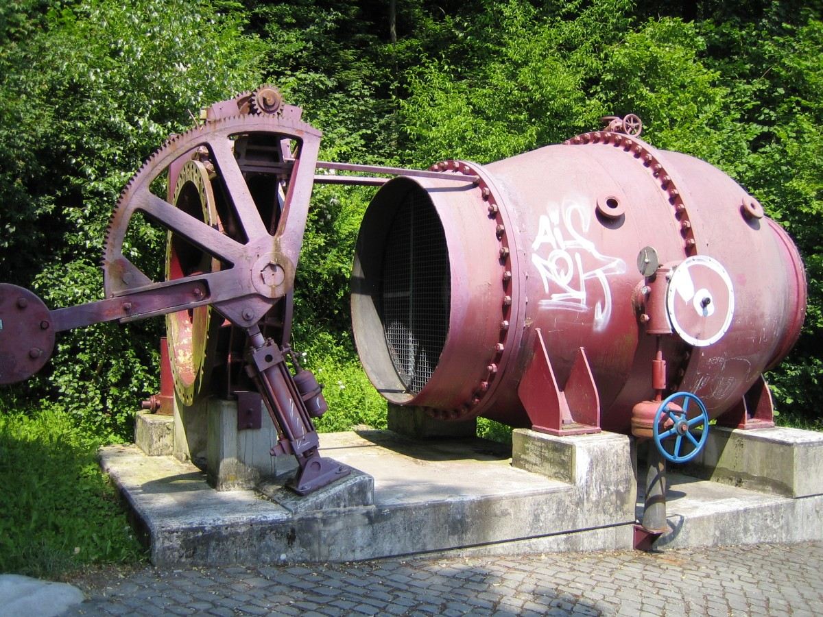 Altes Ringkolbenventil und Absperrklappe der Hennetalsperre in Meschede, Hochsauerlandkreis, Nordrhein-Westfalen